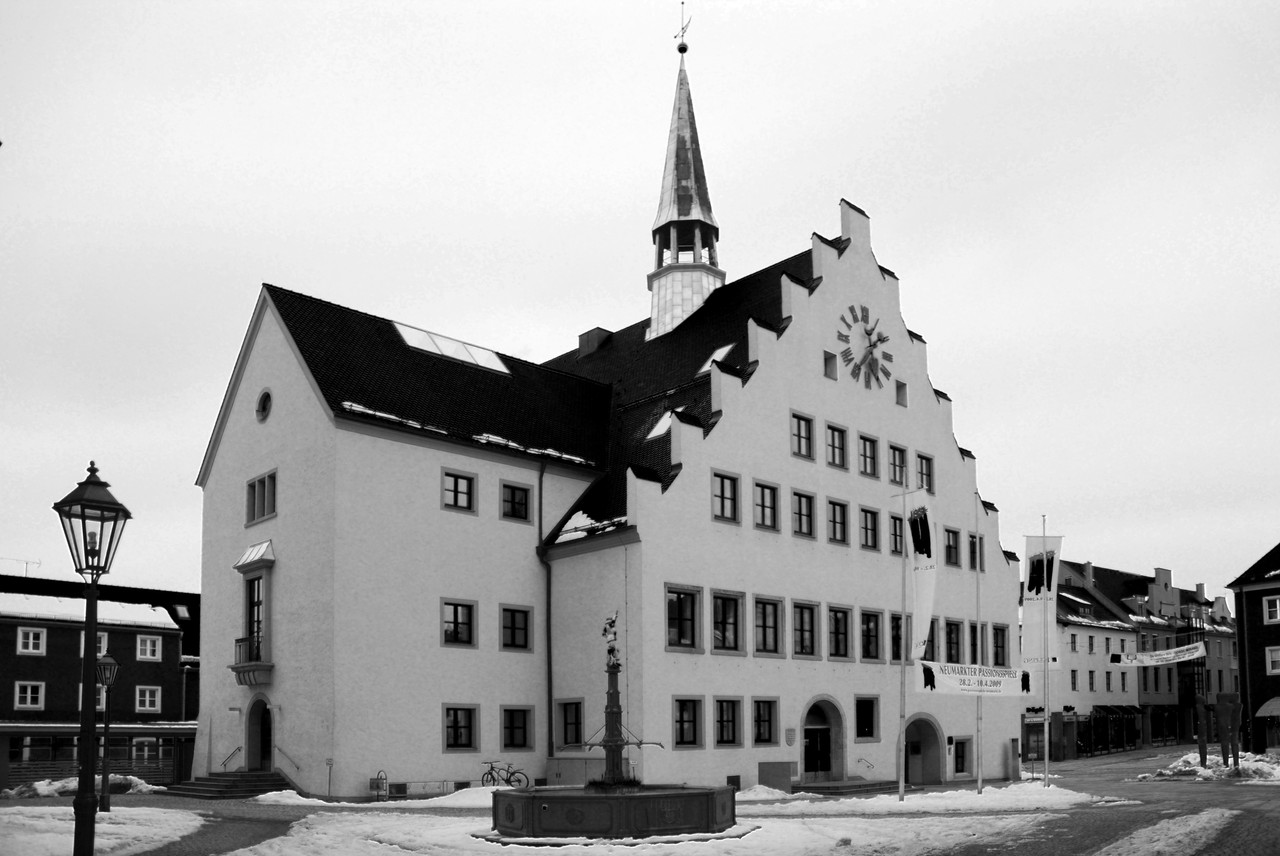 City Hall, Neumarkt in der Oberpfalz, Germany